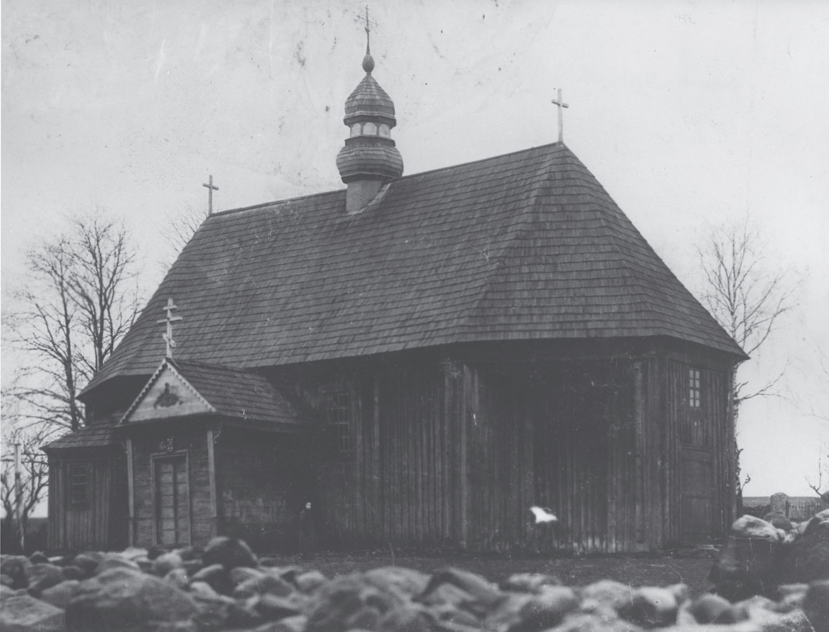 Беларуская (тарашкевіца): Жухавічы Вялікія (Žuchavičy Vialikija). Царква